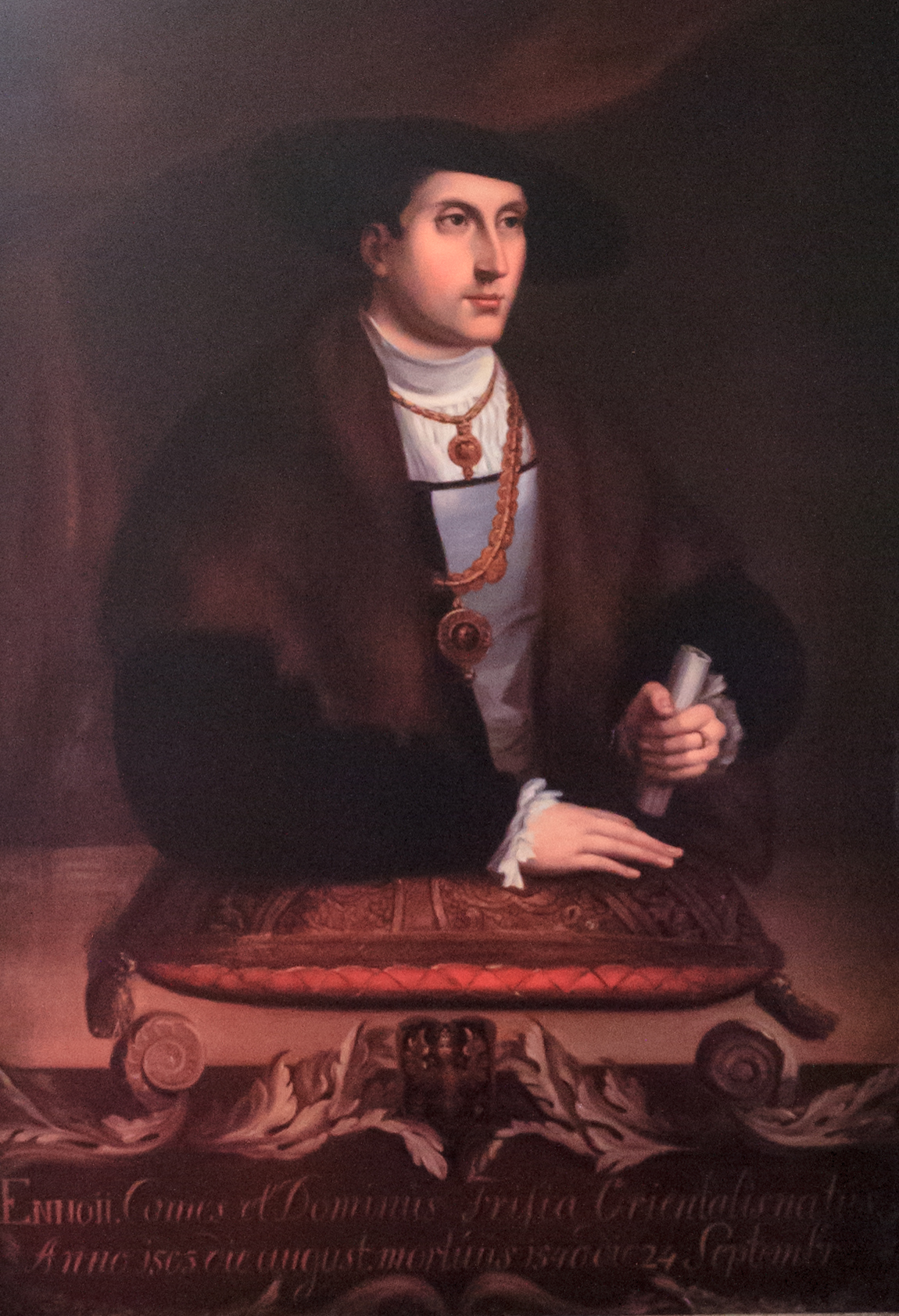 Enno II. Gemälde aus dem Ständesaal der Ostfriesischen Landschaft.